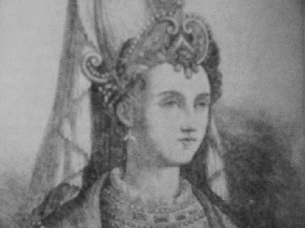 Sułtanka Roksolona